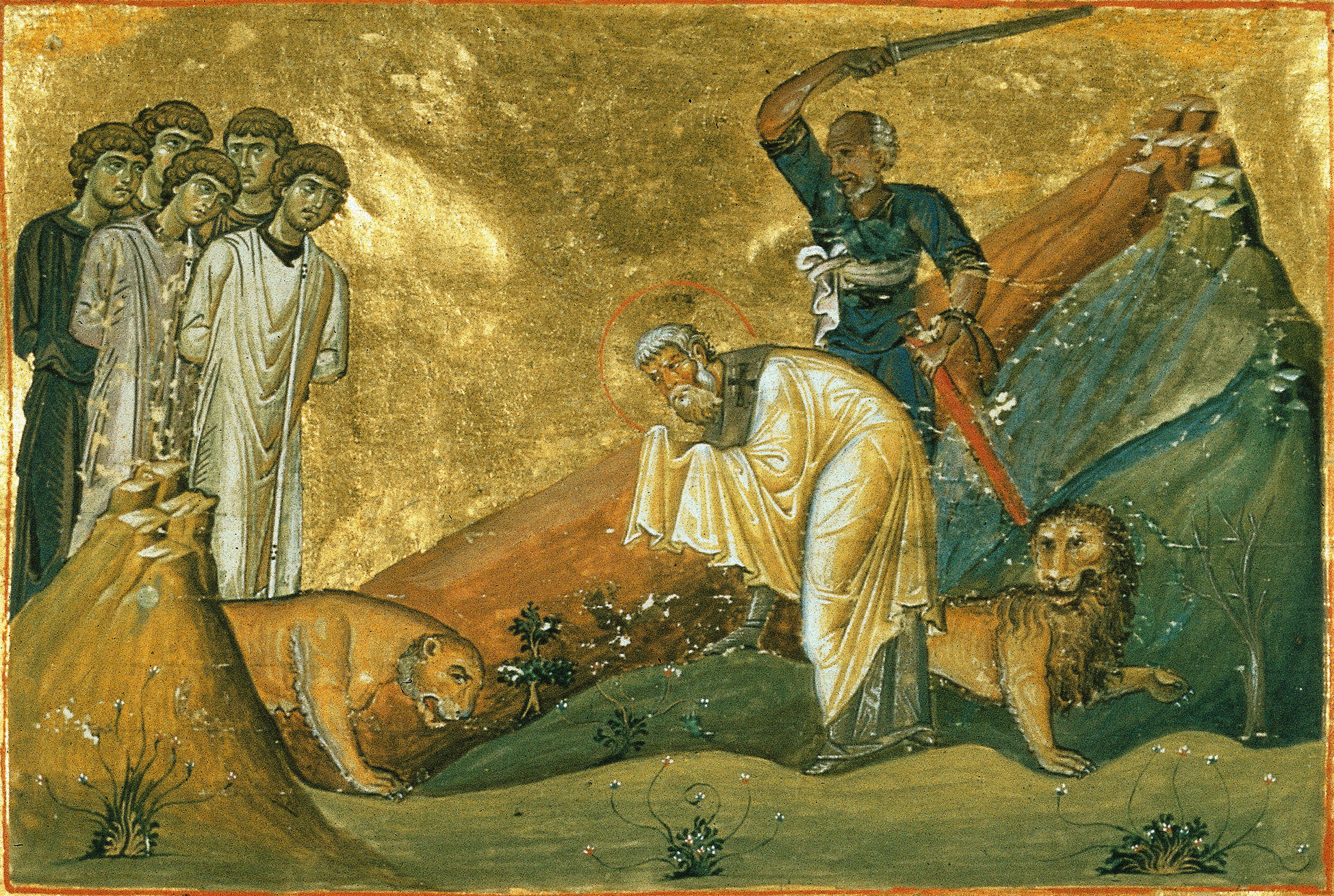 Januarius Святитель Ианнуарий Беневентский / Сщмч. Ианнуарий и с ним пострадавшие მღვდელმოწამე იანუარ ეპისკოპოსი და მისთანა წამებულნი ფავსტო, პროკულ და სოსიოს დიაკონნი, დოსითეოზ მკითხველი, ევტიქი და აკუტიონი (დაახლ. 305) 21 (04.05) აპრილი